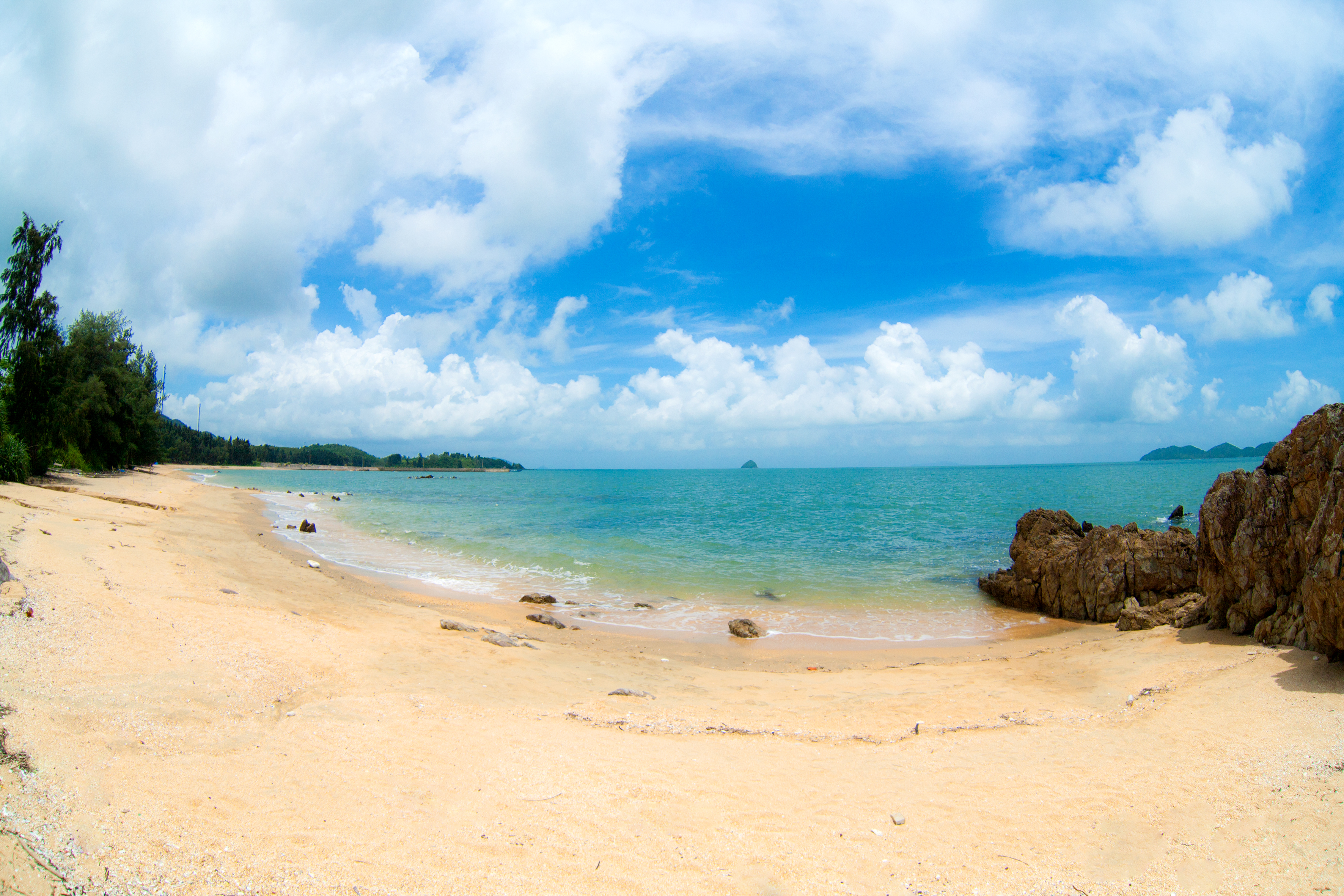 Cái Chiên, Hải Hà, Quảng Ninh, Vietnam